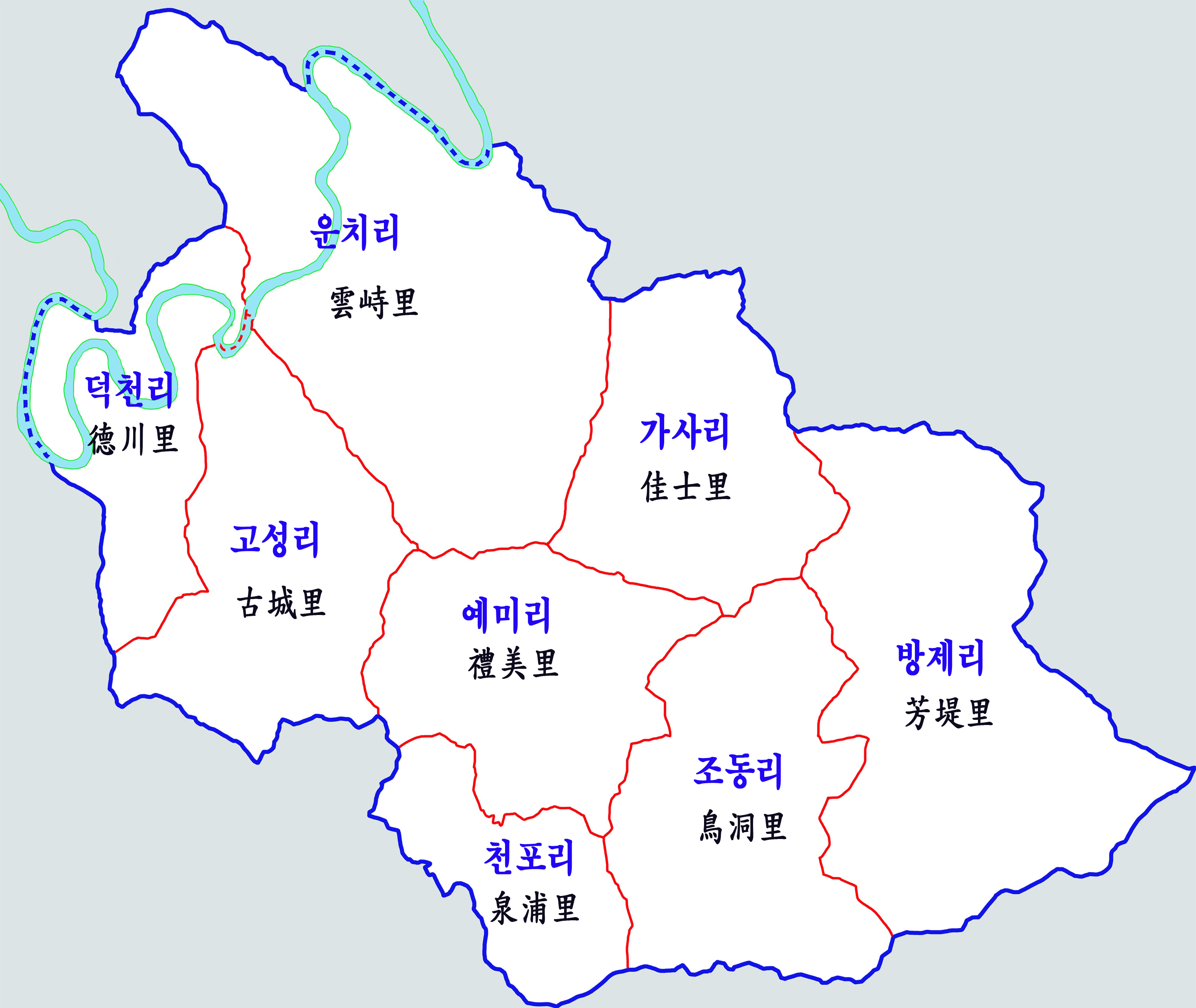 정선군 신동읍 행정지도